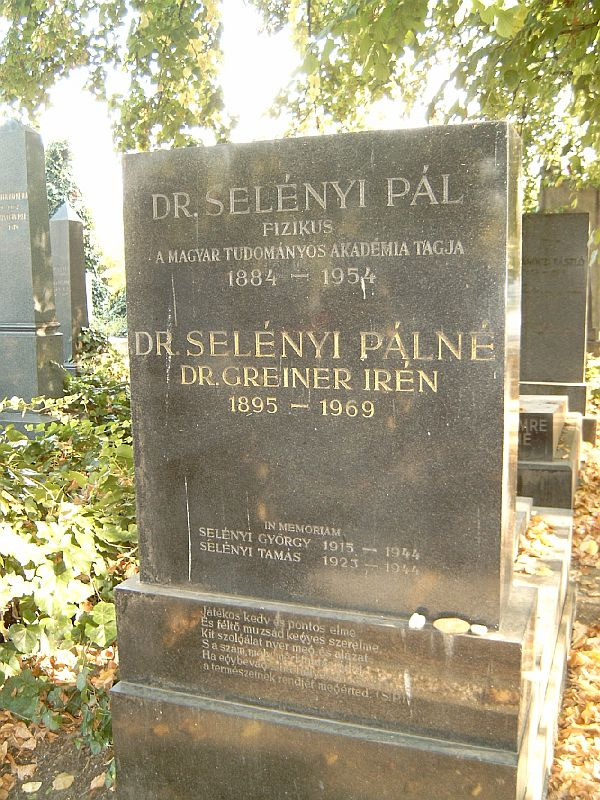 Selényi Pál (Adony, 1882. nov. 17. – Bp., 1954. márc. 21.): fizikus, az MTA l. tagja sírja Budapesten. Kozma utcai izraelita temető: 5B-6-1.